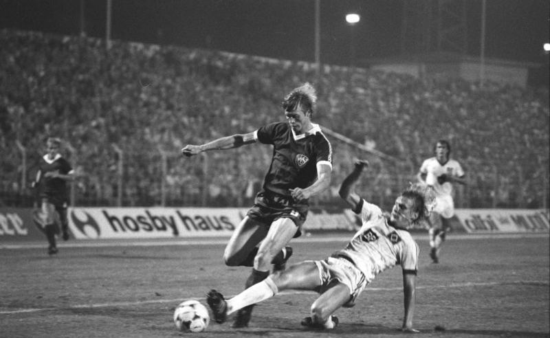 ADN-ZB/Mittelstädt/15.9.1982/ Berlin: Fußball-Europapokal der Landesmeister BFC Dynamo-Hamburger SV 1 : 1 (1:1)/ Der Hamburger Holger Hieronymus (r.) stoppt mit letztem Einsatz Hans Jürgen Riediger (l.), der in der 17. Minute den Führungstreffer für die Gastgeber erzielt hatte. Im ausverkauften Berliner Jahn-Sportpark trennte sich der vierfache DDR-Meister im Hinspiel des Meistercoups vom BRD-Titelträger unentschieden und steht im Rückspiel am 29.9.1982 in Hamburg vor einer schweren Aufgabe.